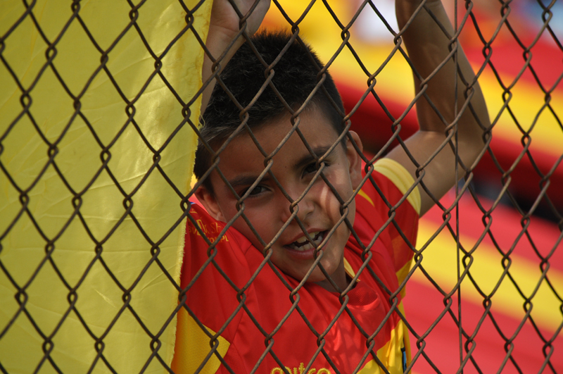 La pasión por el "Gallego" nace desde muy chico